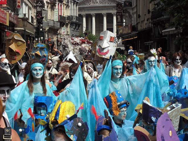 Sfeerbeeld van de kleurrijke Zinneke Parade in Brussel.